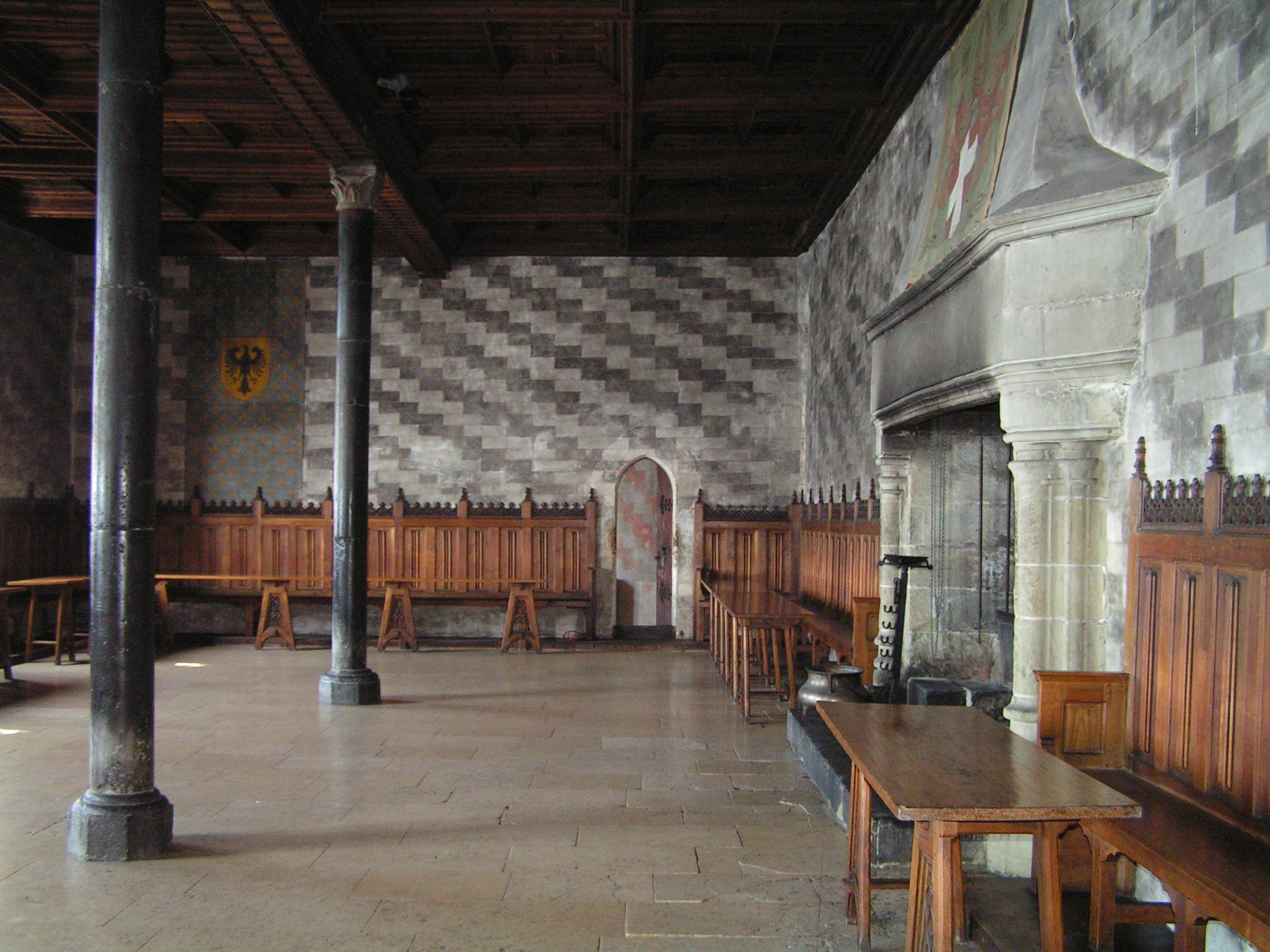 Festsaal im Schloss Chillon, Veytaux-Montreux, Schweiz